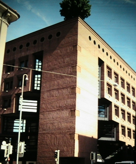 Fotis: Ella Strug, 19-24/5/2005. Donis permeson por kopii la diapozitivon por publikigo en Vikipedio al Biciklanto